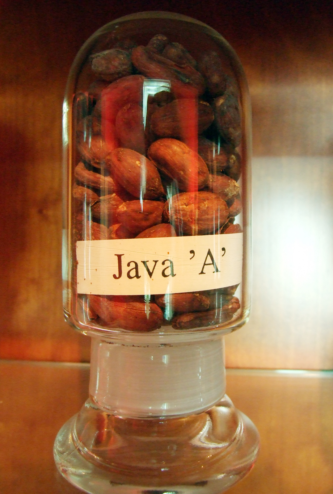 Coffea arabica - Java Beans